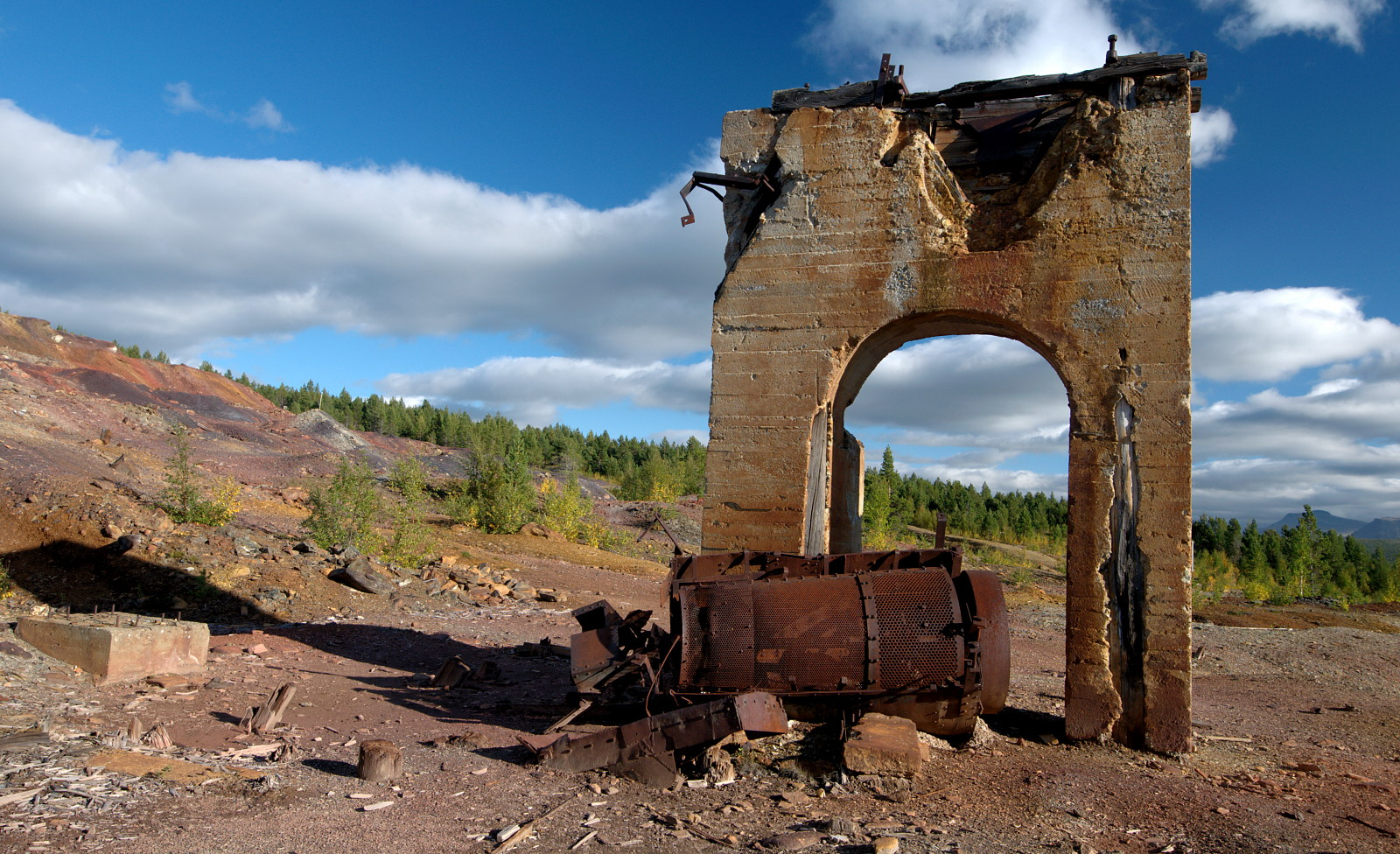 Rester etter vaskeriet ved Folldal gruver